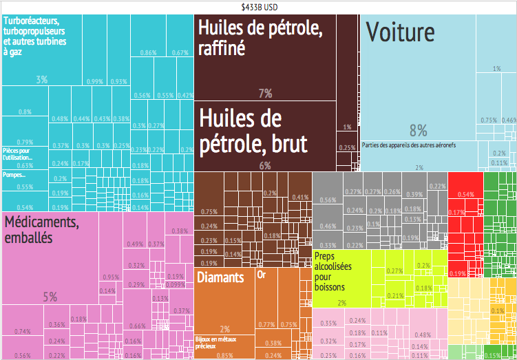 2012 Royaume-Uni exportation de produits treemap